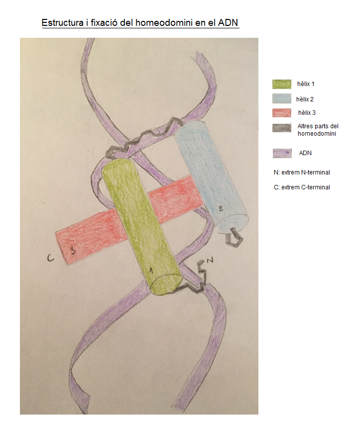 Estructura i fixació del homeodomini en el ADN. Adaptat i traduit de Alberts, B. Molecular biology of the cell 6th edition